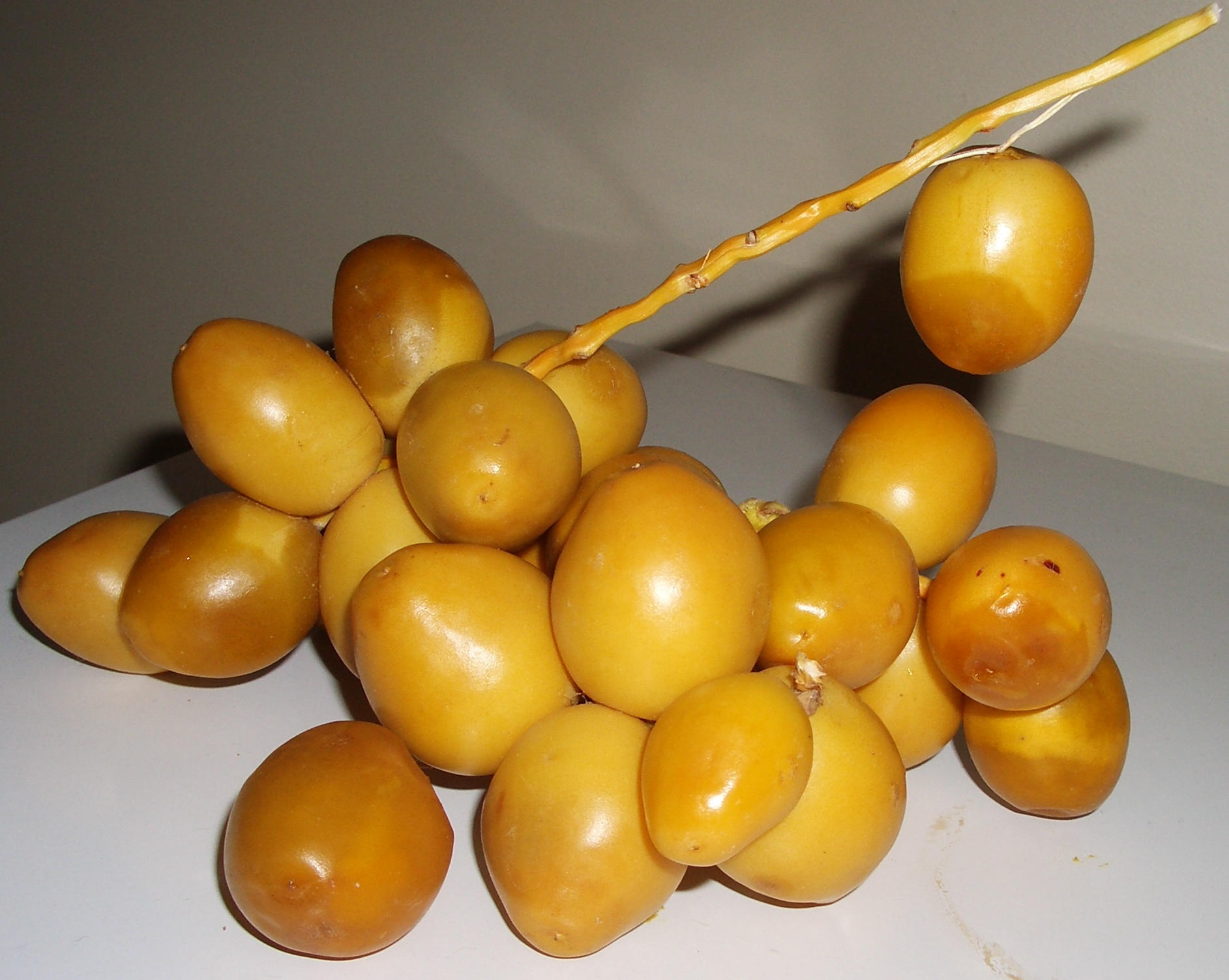 Des dattes fraîches achetées en France